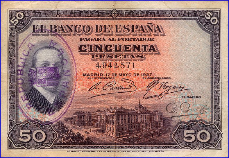 billet de banque